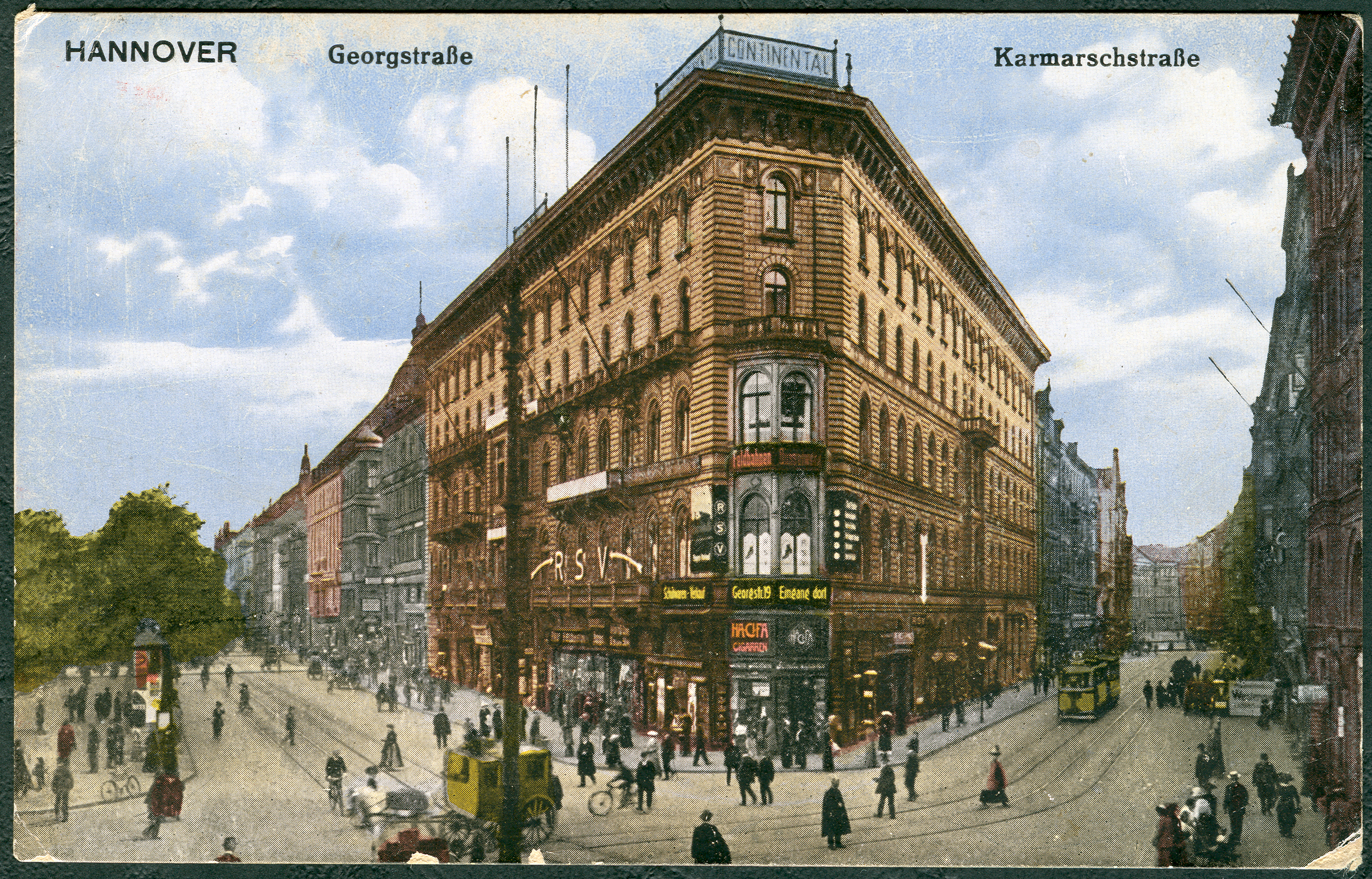 Kolorierte Ansichtskarte Nummer 145 eines anonymen Fotografen; Café und Hotel Continental zwischen Georgstraße und Karmarschstraße; anstelle des durch die Luftangriffe auf Hannover im Zweiten Weltkrieg zerstörte Gebäude am Kröpcke findet sich heute (Stand: Juni 2012), nach mehreren Zwischenstadien, das sogenannte Kröpcke-Center.